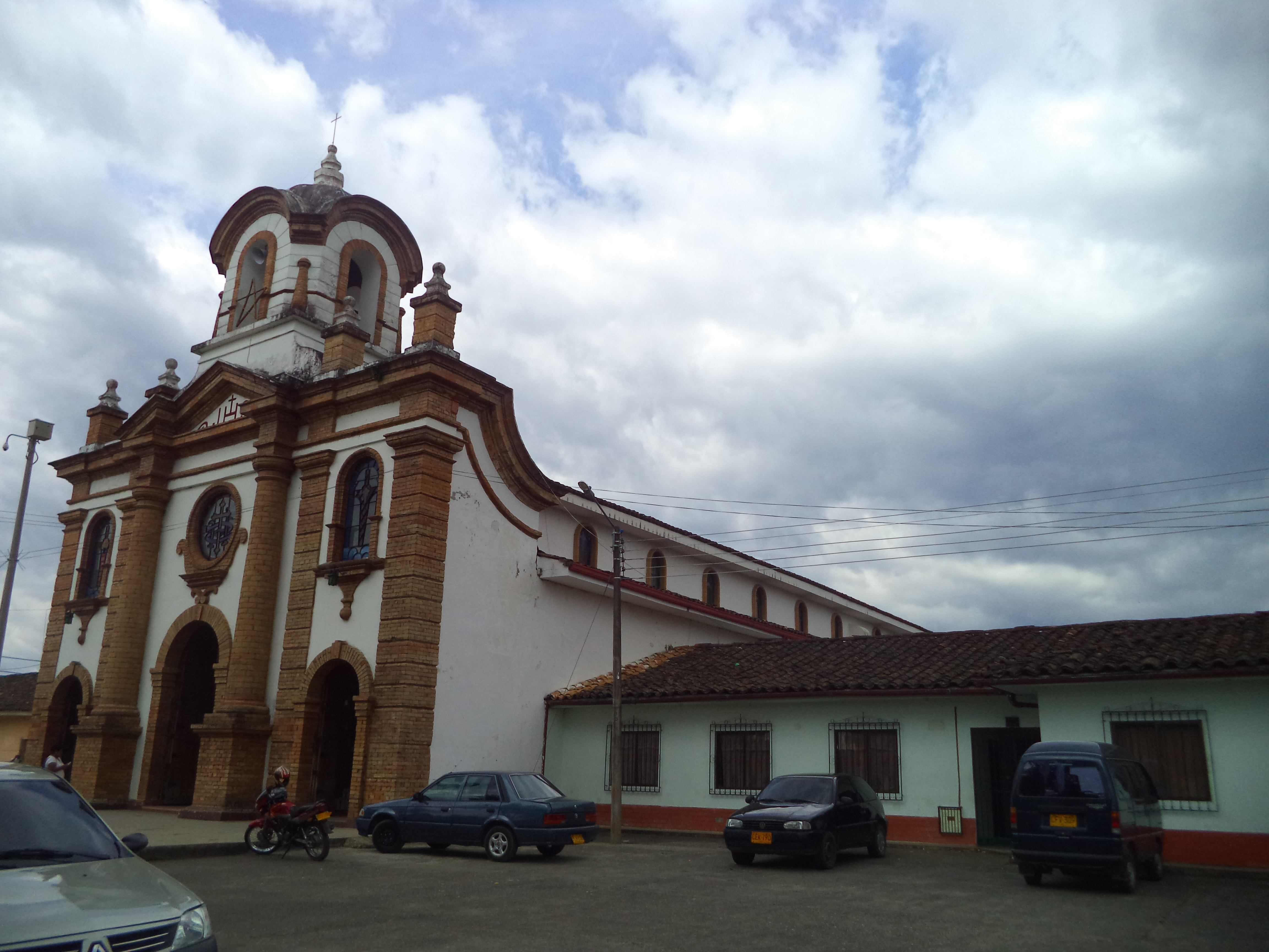 La iglesia de San Pedro es una de las dos iglesias de Timbio, Cauca, es la mas antigua de estas, al ser construida en el siglo XVII